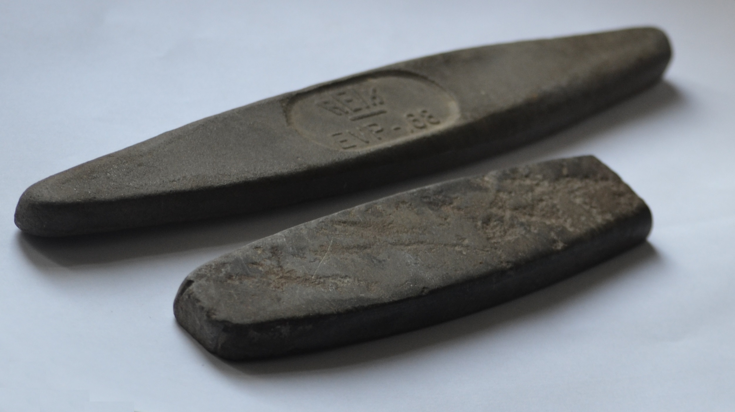 Natürlicher (unten, Herkunft unbekannt) und künstlicher (oben, vom VEB Schleifkörper Union Dresden-ReickWetzstein.